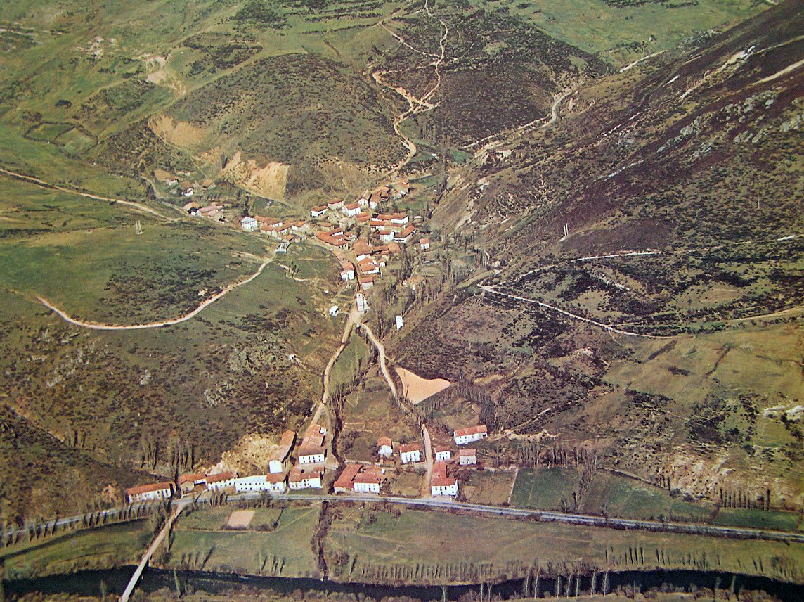 Pueblo de Éscaro (León) en el año 1972